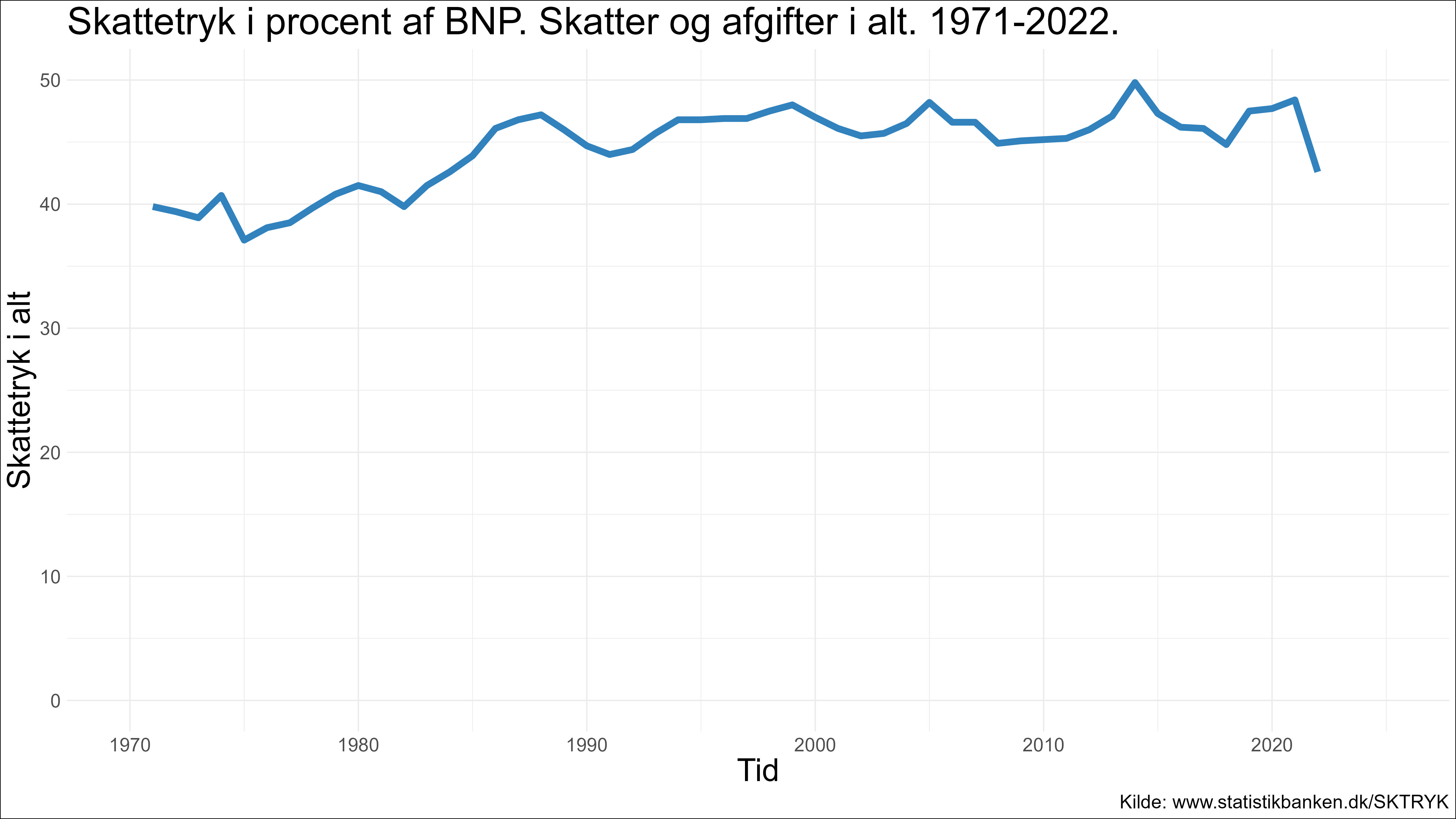 Traditionelt skattetryk i Danmark, data hentet fra Danmarks Statistiks statistikbank